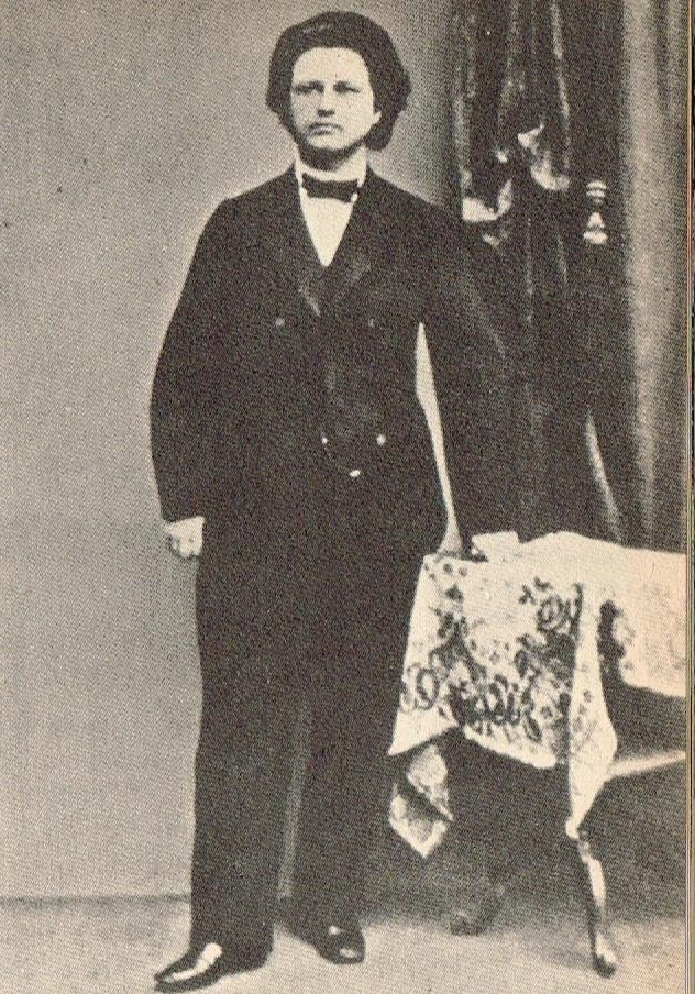 בימי לימודיו התיכוניים